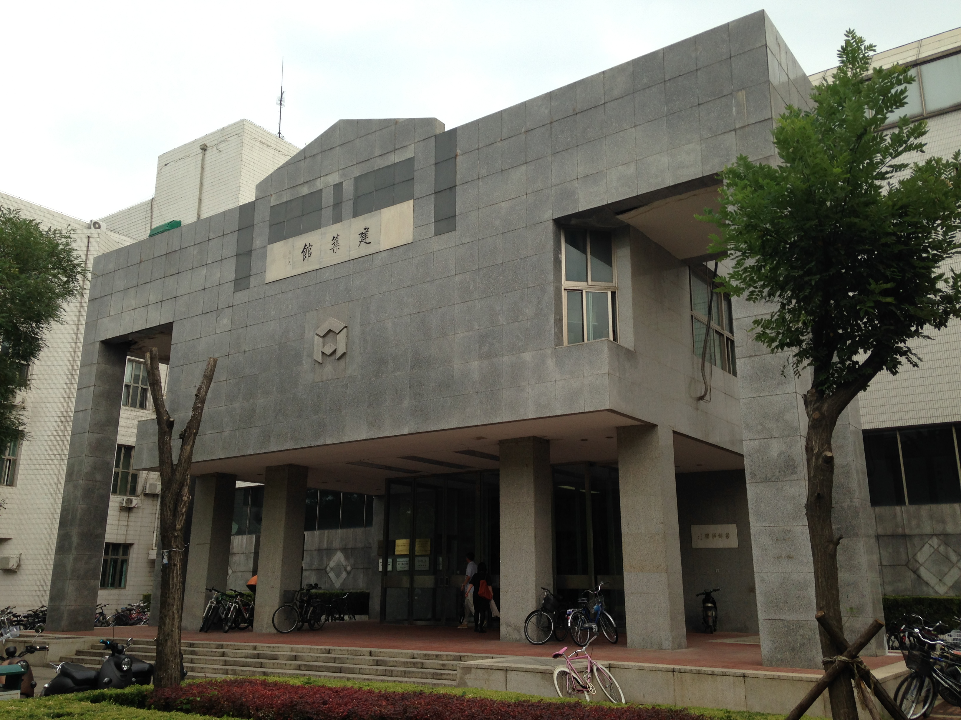 清華大学・建築館